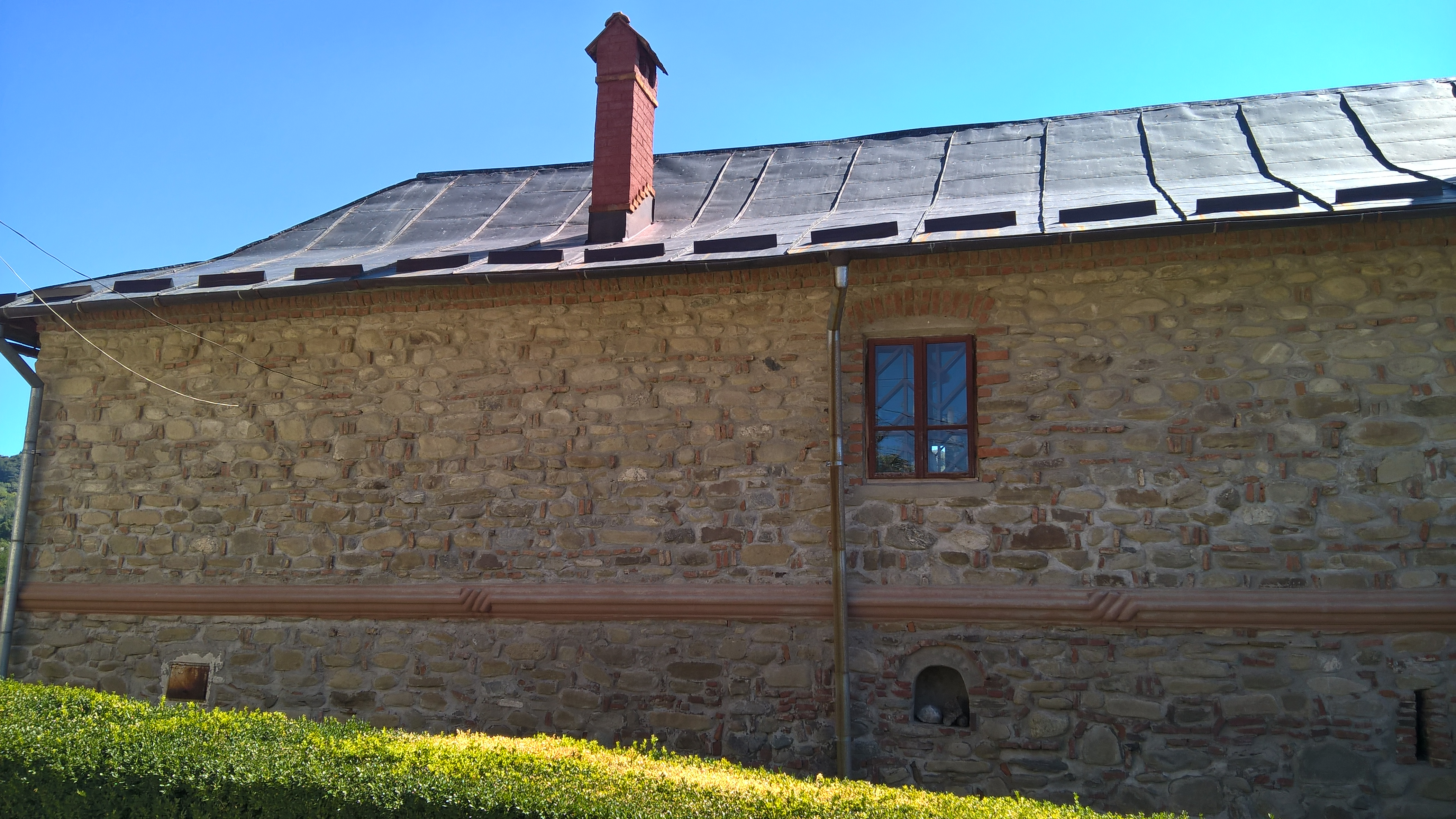 Stăreția 02